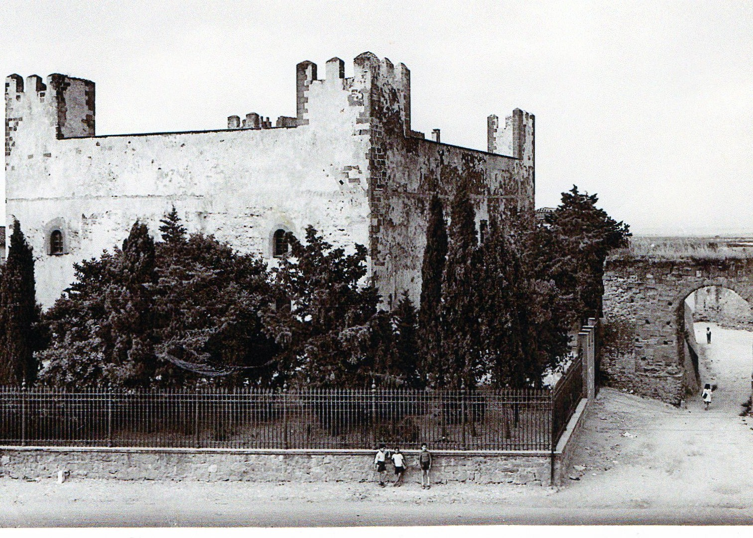 il castello di Sanluri (Sardegna)